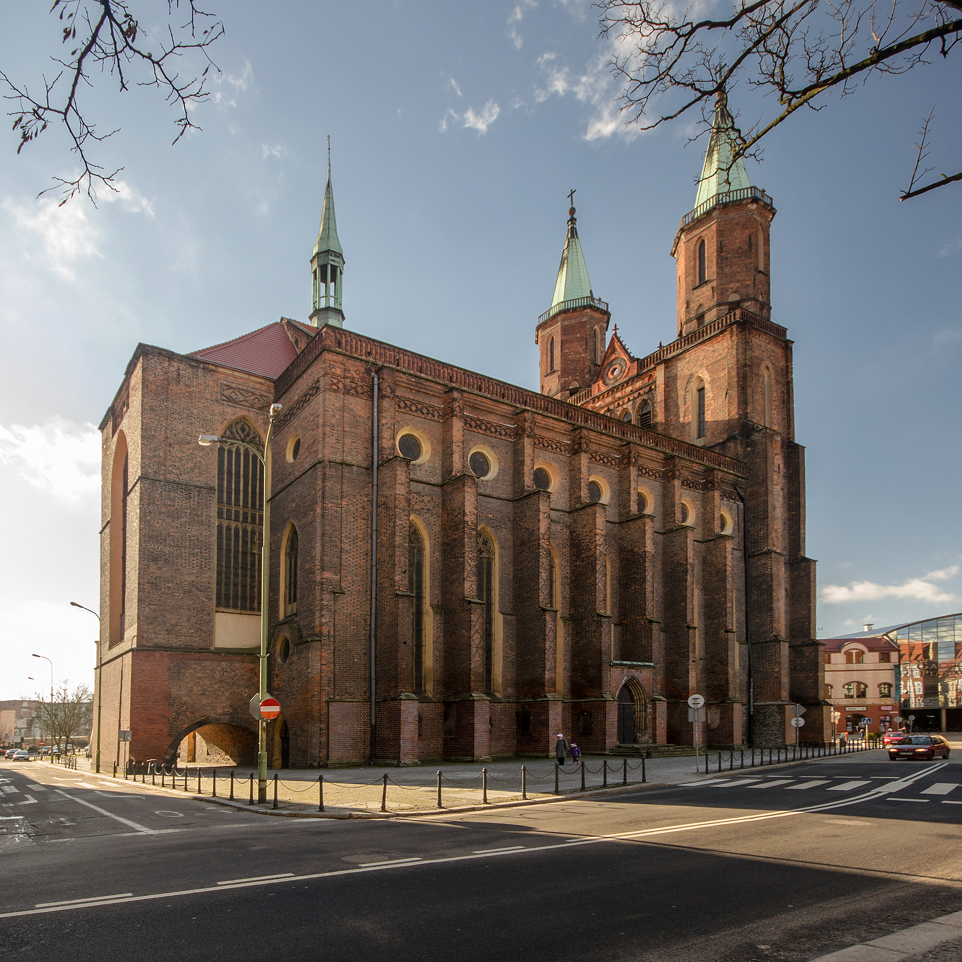 Legnica, kościół p.w. Najśw. Marii Panny, ob. ewangelicki, kon. XII, 1340-1386, XV, XX